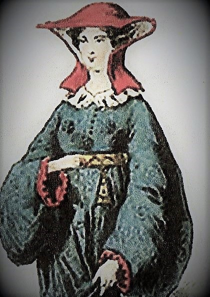 ritratto della giudicessa regnante Elena di Gallura (dal 1203 al 1218), in Sardegna